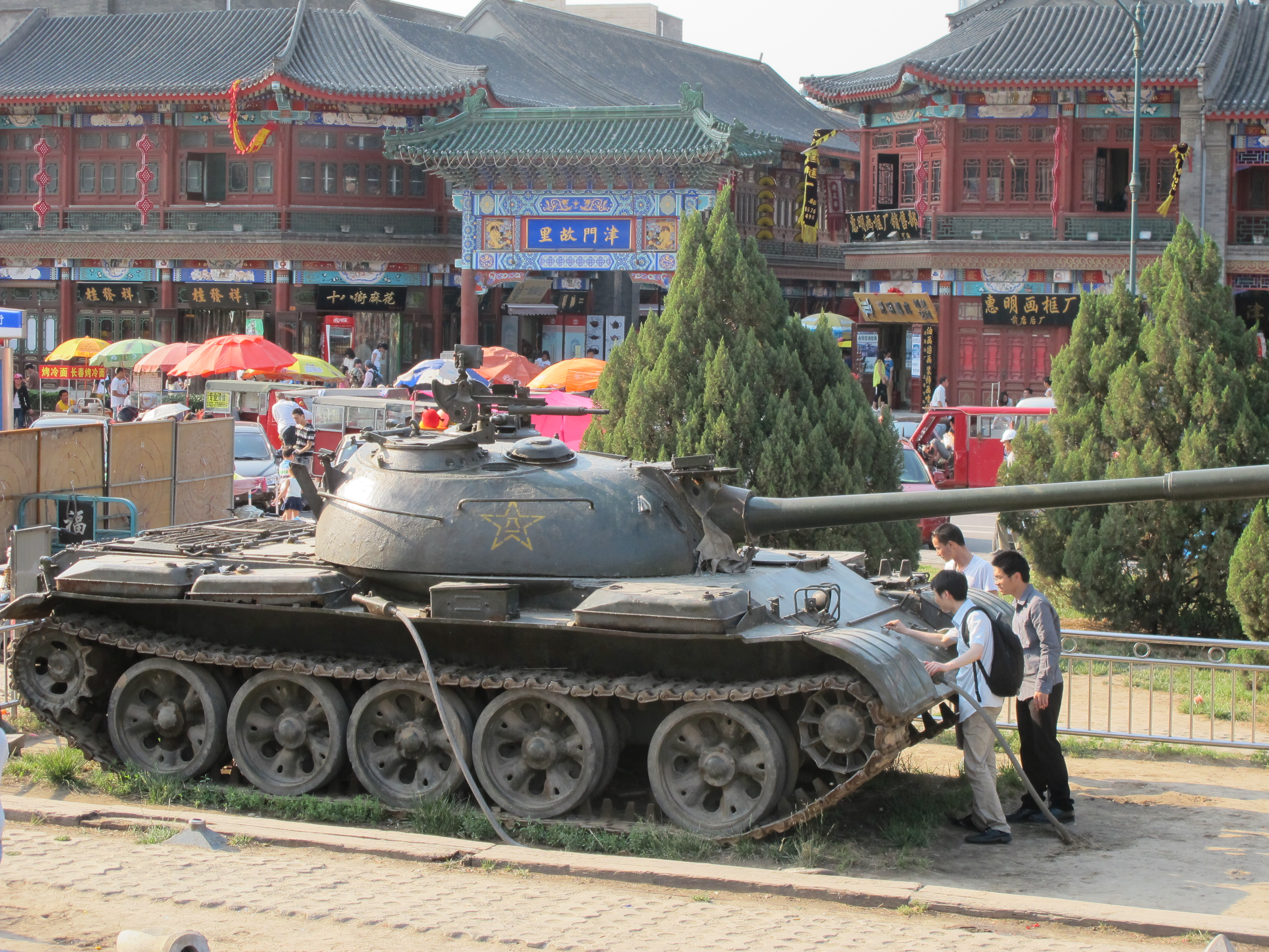 Tianjin, entrée sud du quartier de l'Ancienne Culture Guwenhuajie. Char d'assaut réformé utilisé comme monument public. Vu du sud.